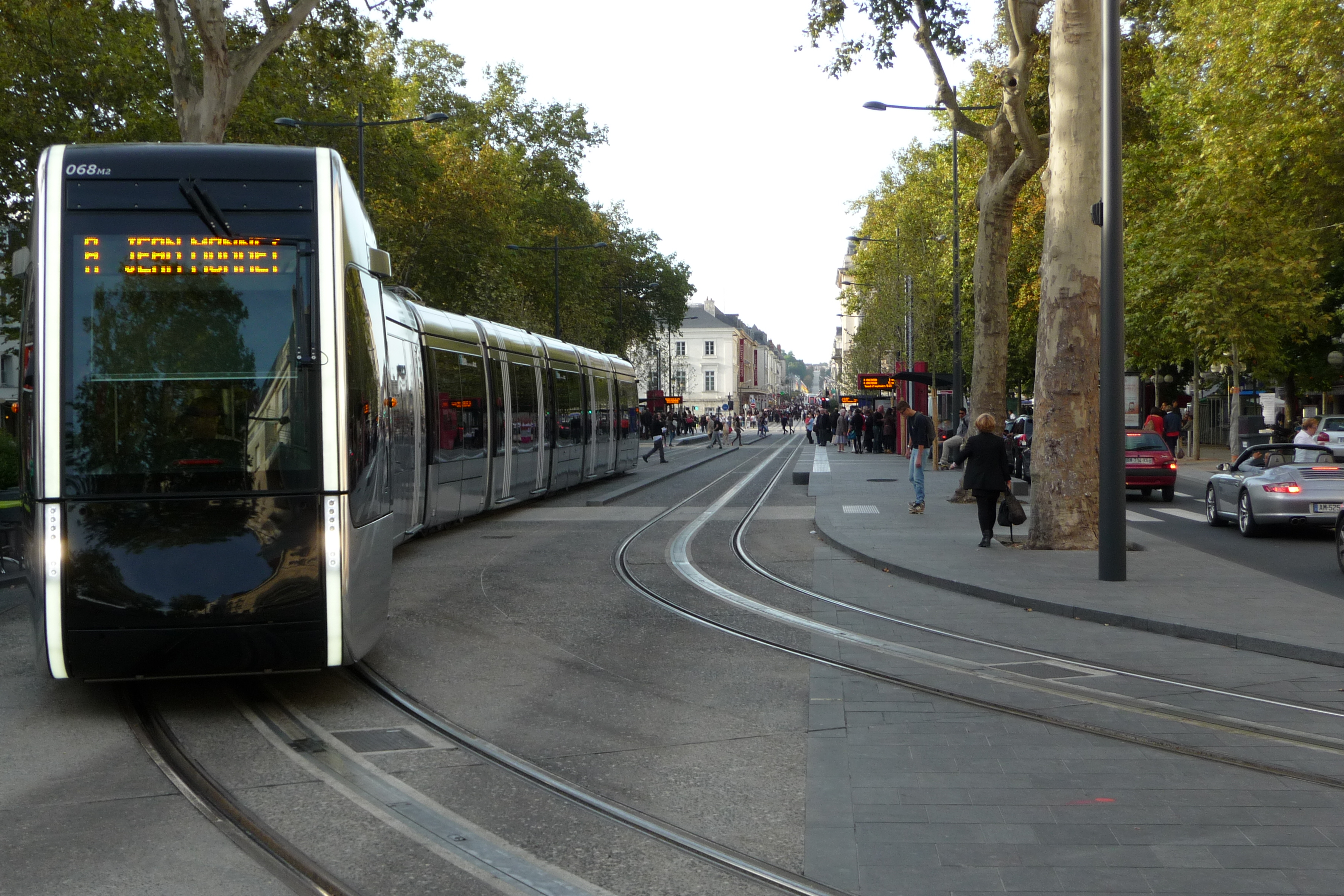 Rame du tramway de Tours, avenue Grammont, entre les arrêts « Jaurès » et « Gare SNCF Tours ».